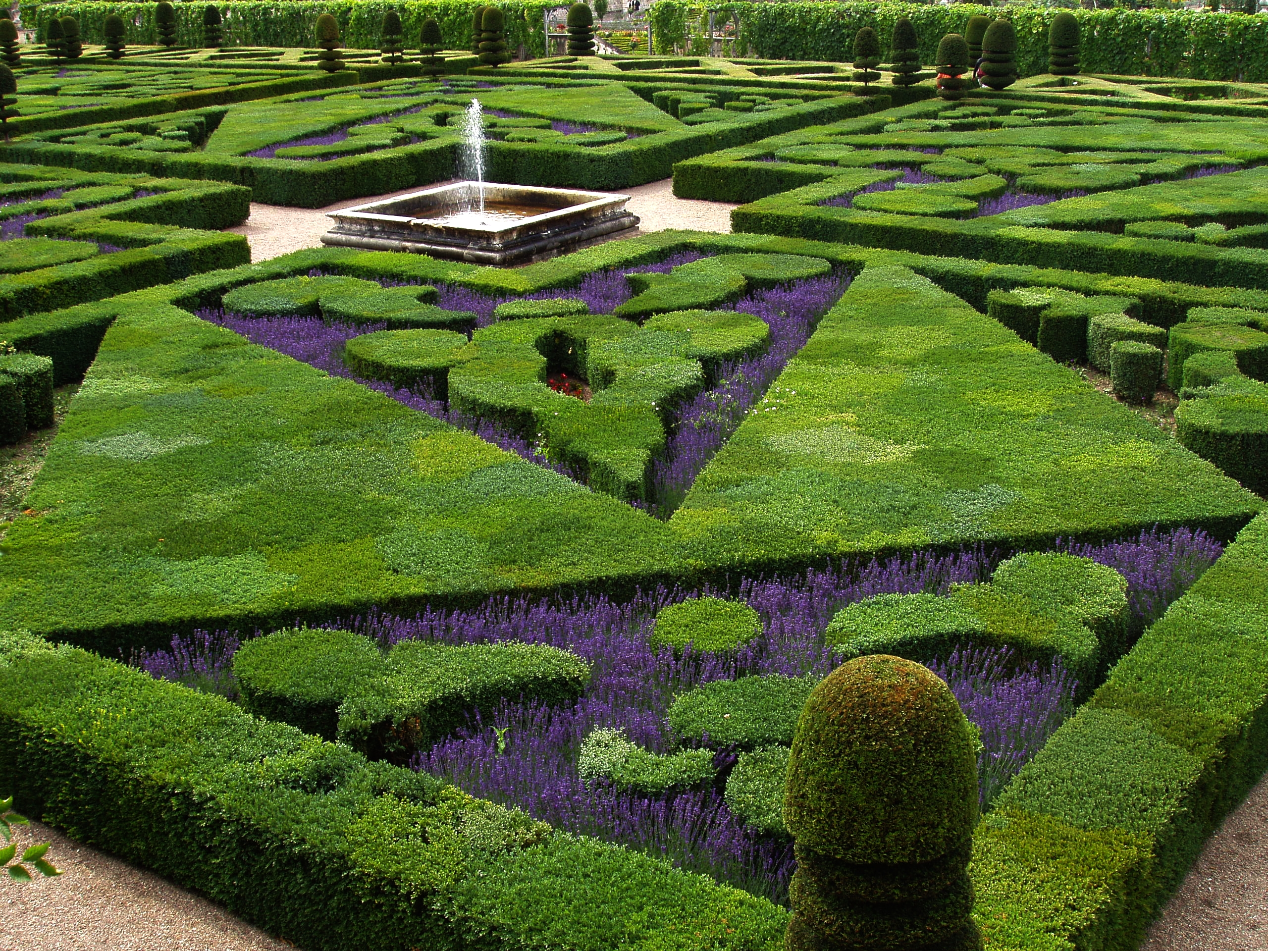 big boss et beaux gosses